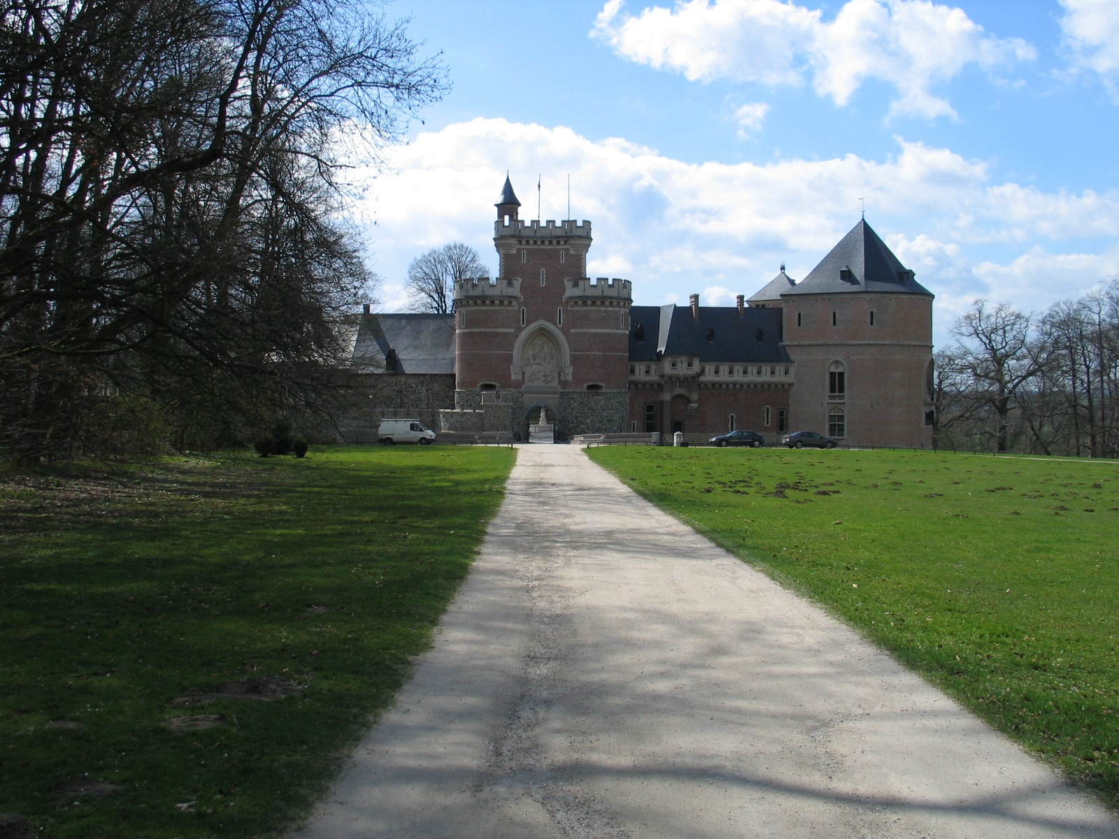 hoofdingang kasteel Gaasbeek - eigen foto